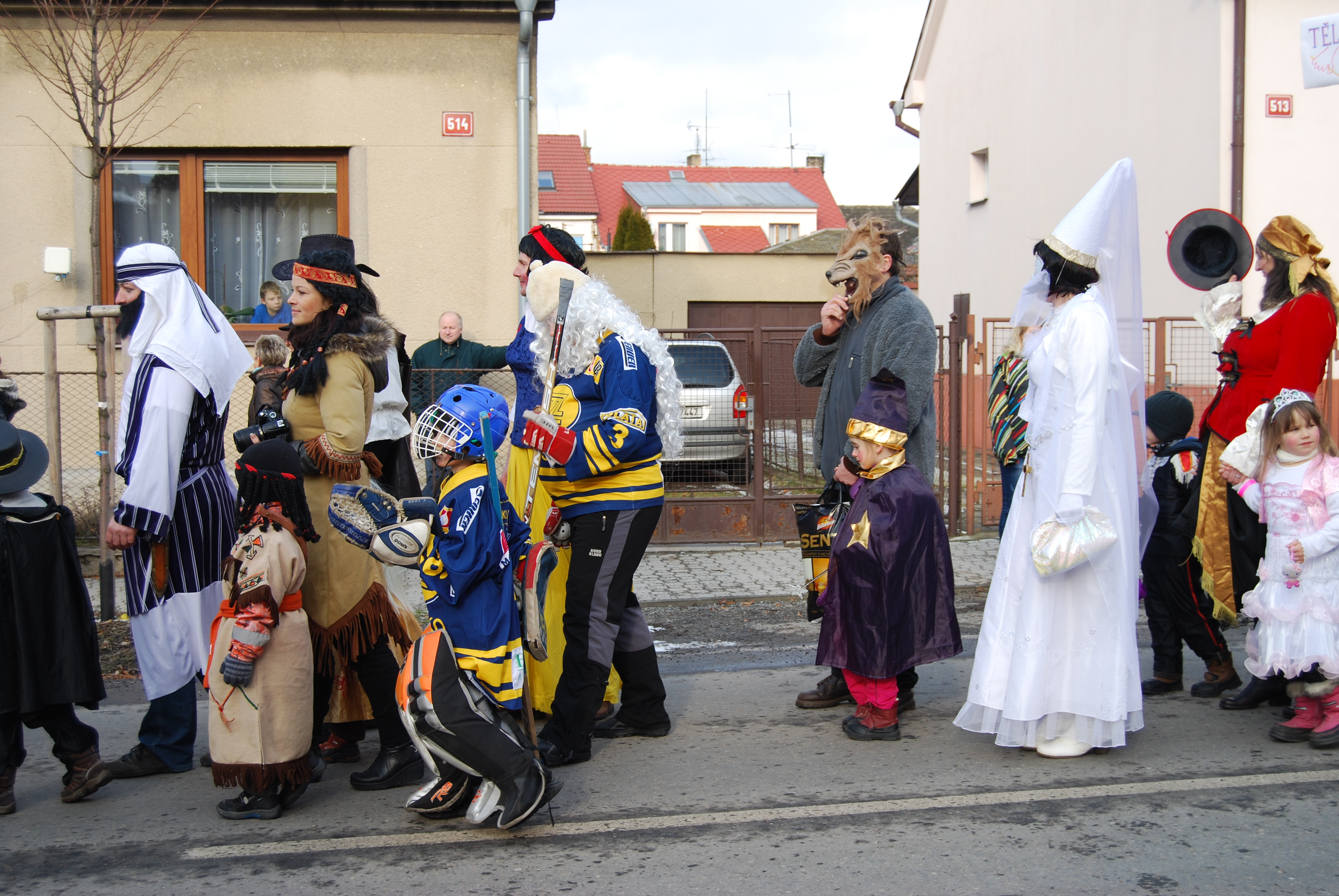 Milevské maškary 2013. Milevsko. Okres Písek. Česká republika.